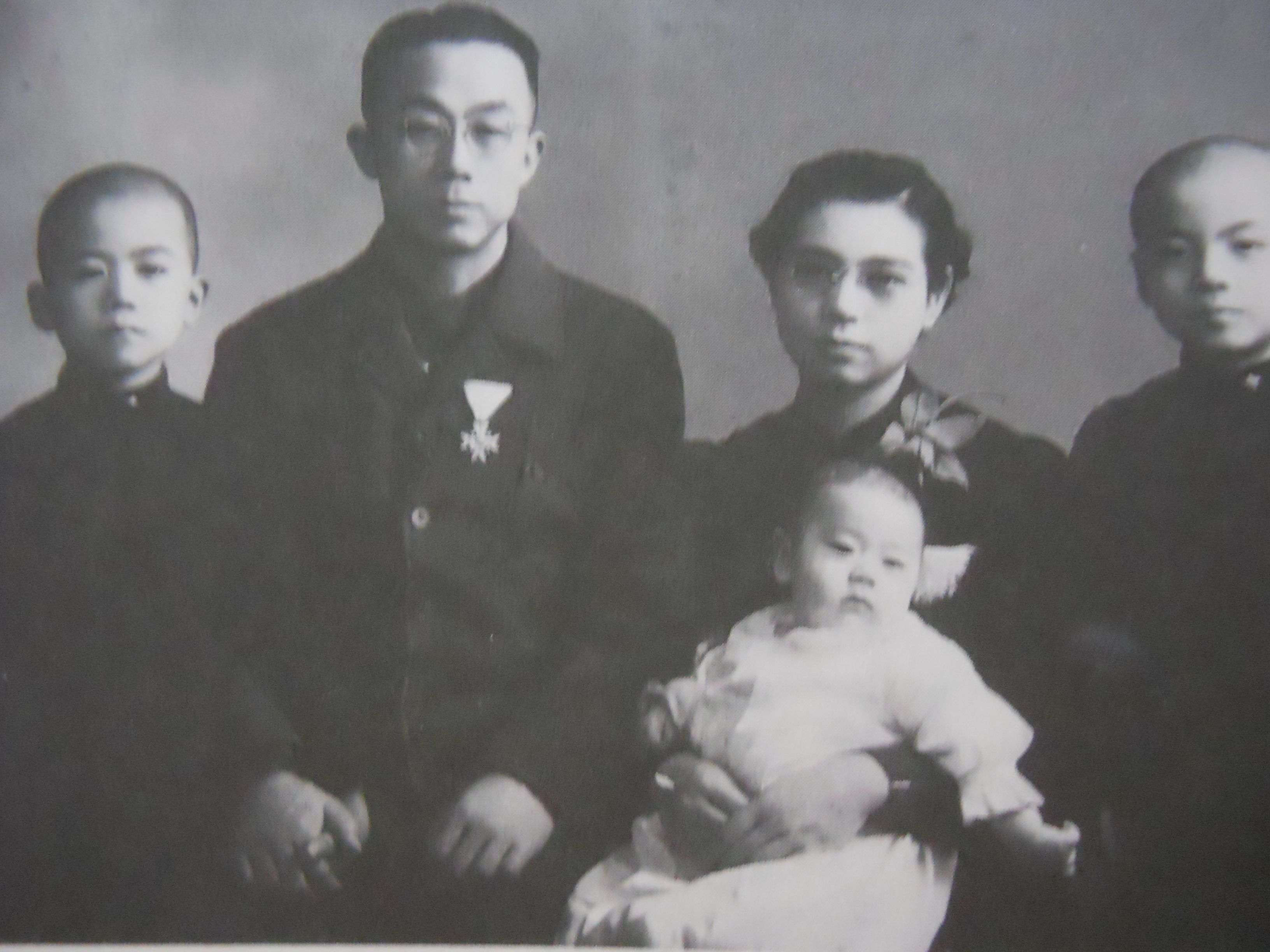 Ｈａｓｈｉｍｏｔｏ Ｋｅｎｚｏｕ Ｆａｍｉｌｙ